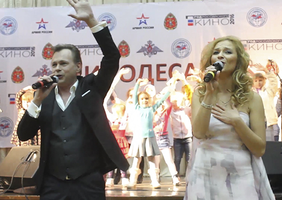 Концерт в честь 13-летия российской авиационной базы Кант в Киргизии. Выступают Владимир и Маруся Лёвкины